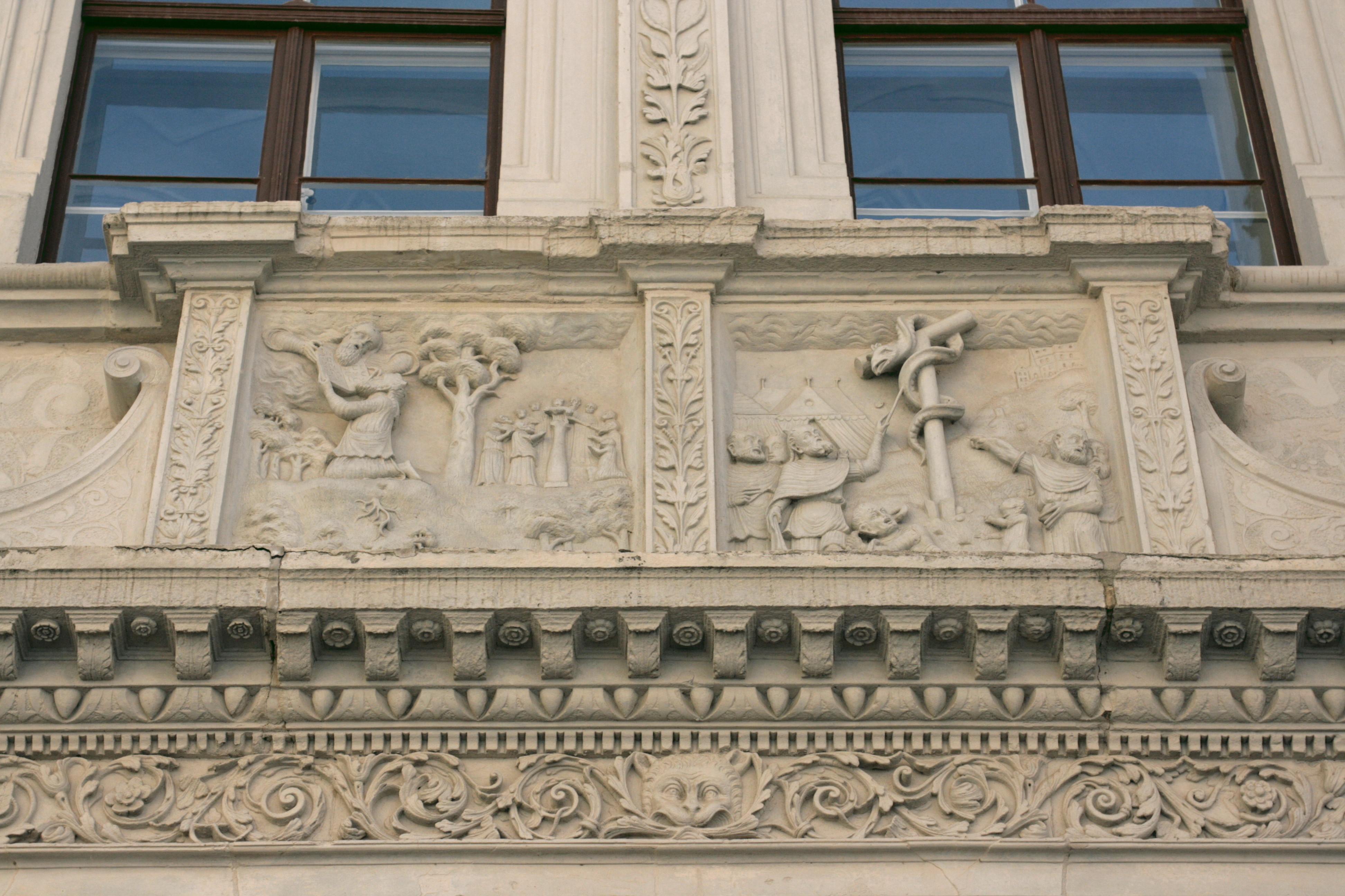 Biblisches Haus, Neißstraße 29 in Görlitz